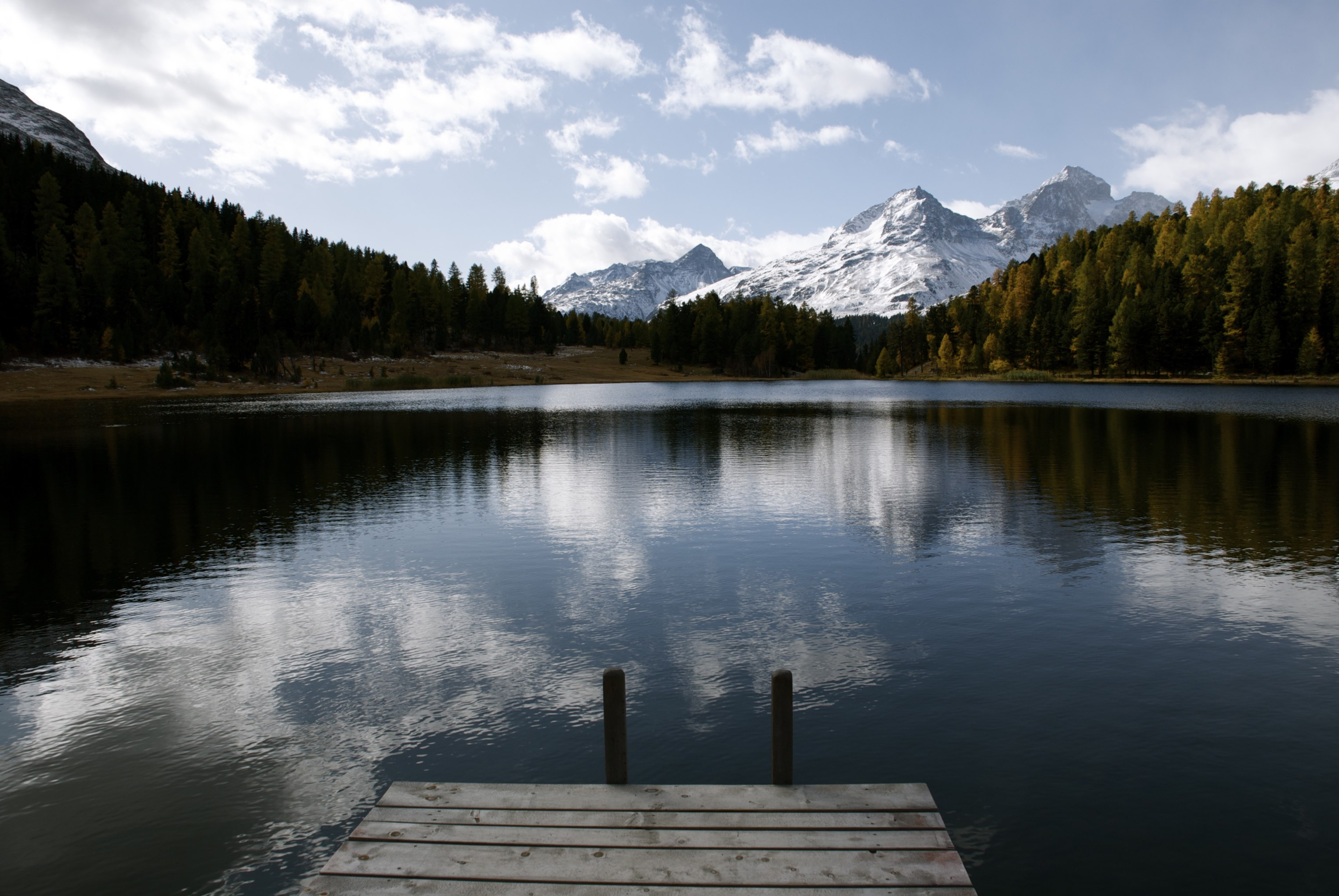 Lej da Staz, im Hintergrund von rechts Piz Julier, Piz Albana und Piz Polschin